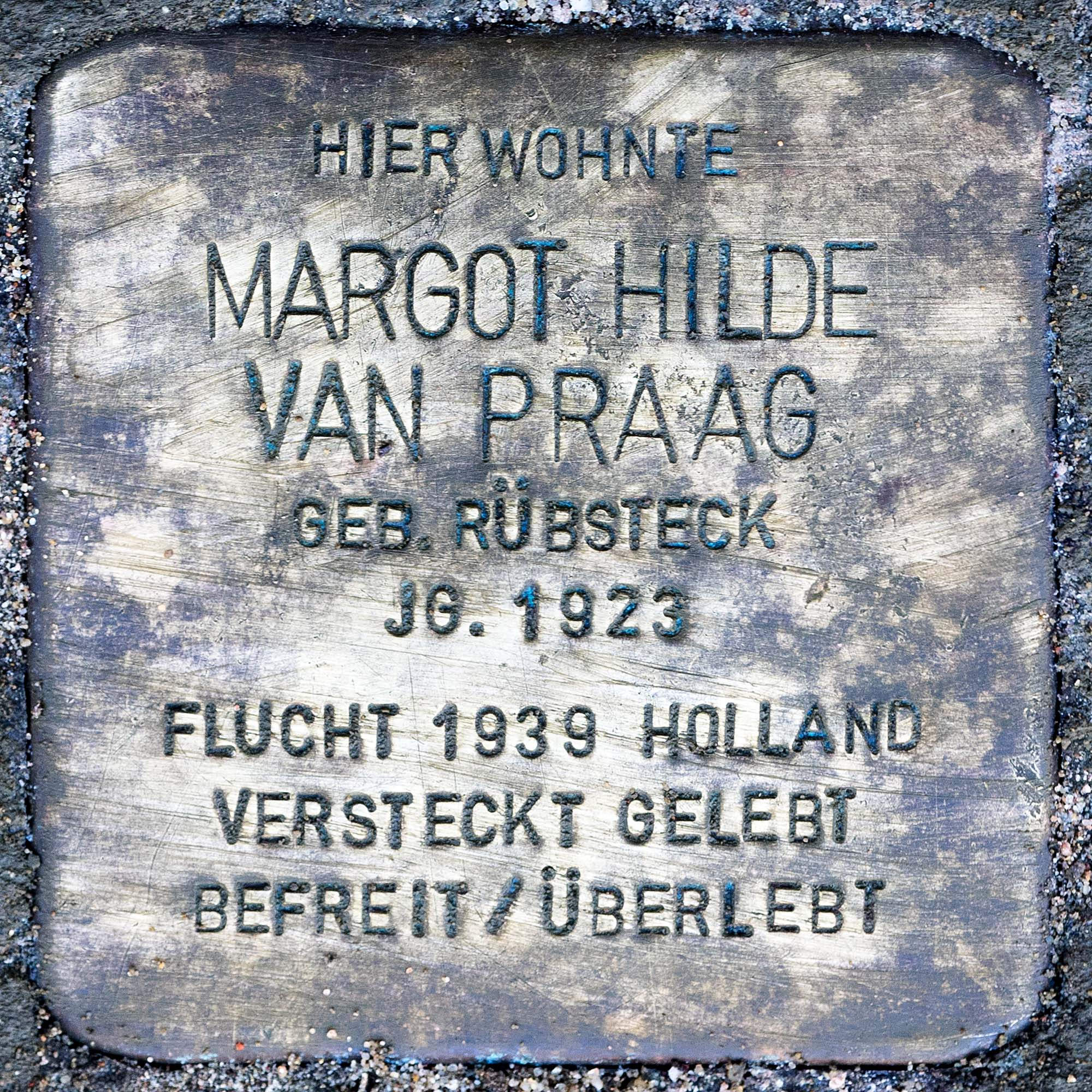 Stolperstein für Van Praag, Margot Hilde